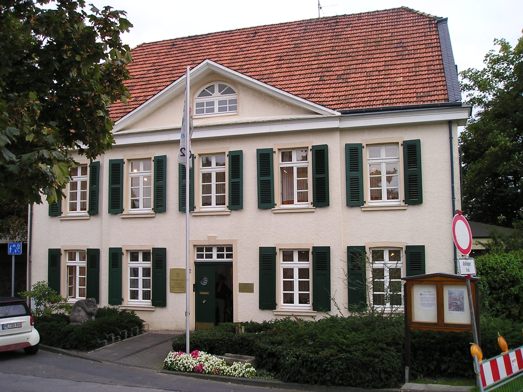 Deusserhaus, Monheim am Rhein